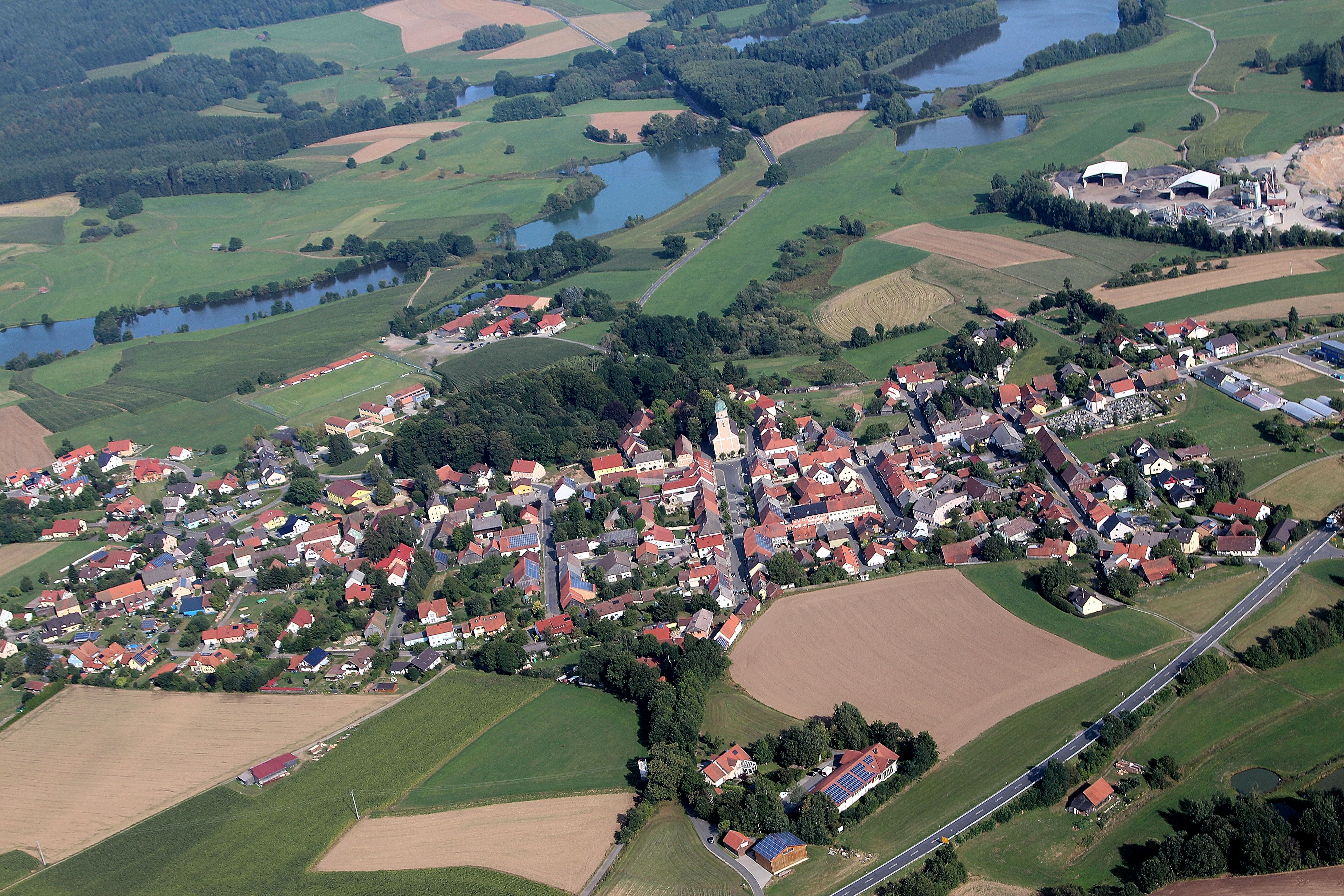 Winklarn, Markt Winklarn, Landkreis Schwandorf, Oberpfalz, Bayern